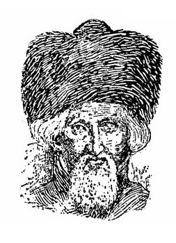 תחריט דיוקנו של המהרש"ל